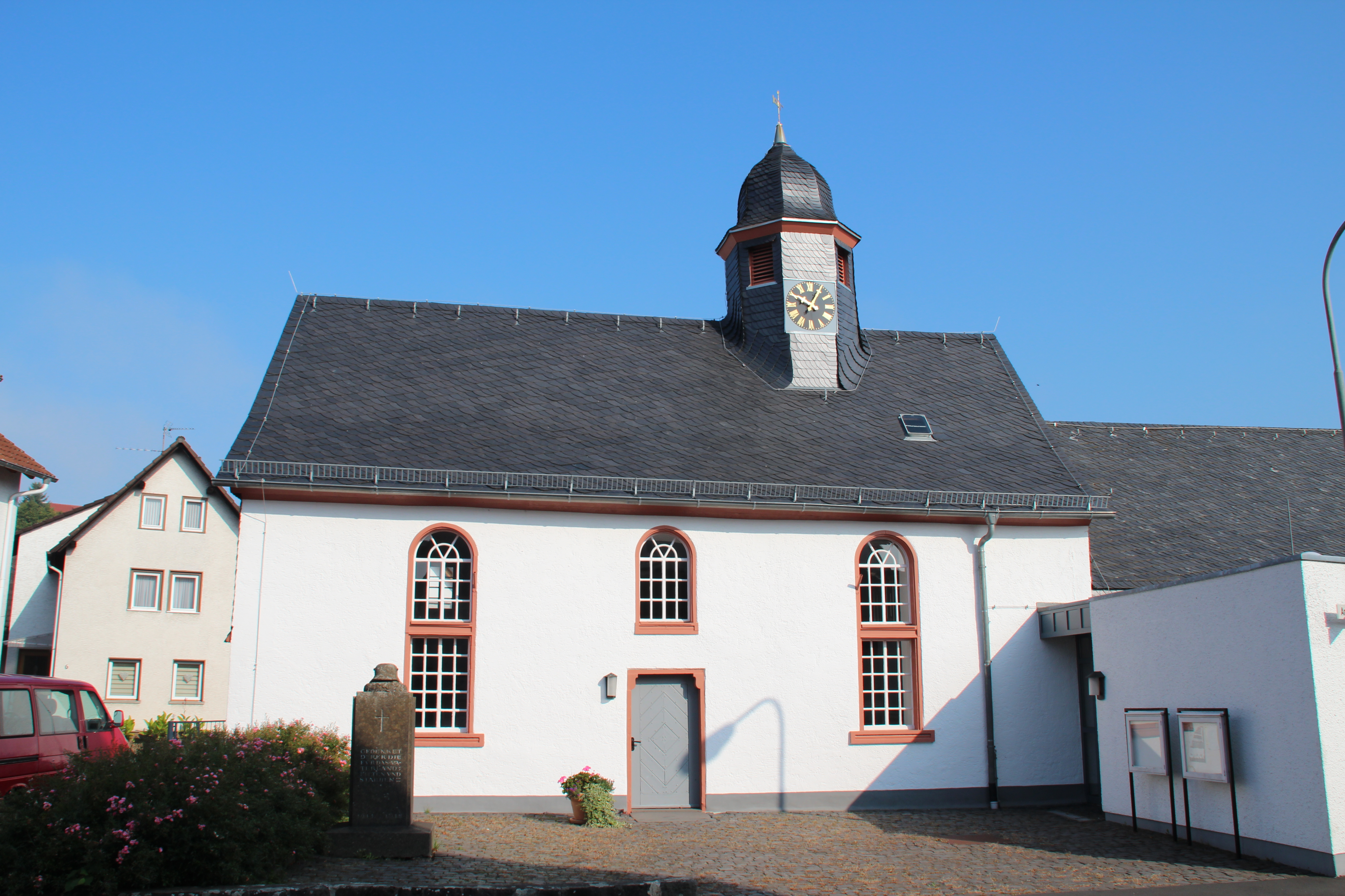 Evangelische Kirche Bersrod, Gemeinde Reiskirchen, Landkreis Gießen, Hessen, Deutschland